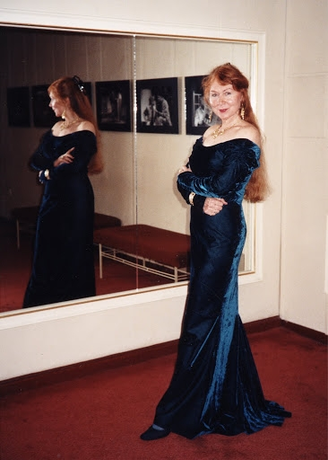 Ortrun Wenkel bei ihrem Rollendebut als "Klytämnestra" in "Elektra" (Richard Strauss) am Mecklenburgischen Staatstheater Schwerin, 2002